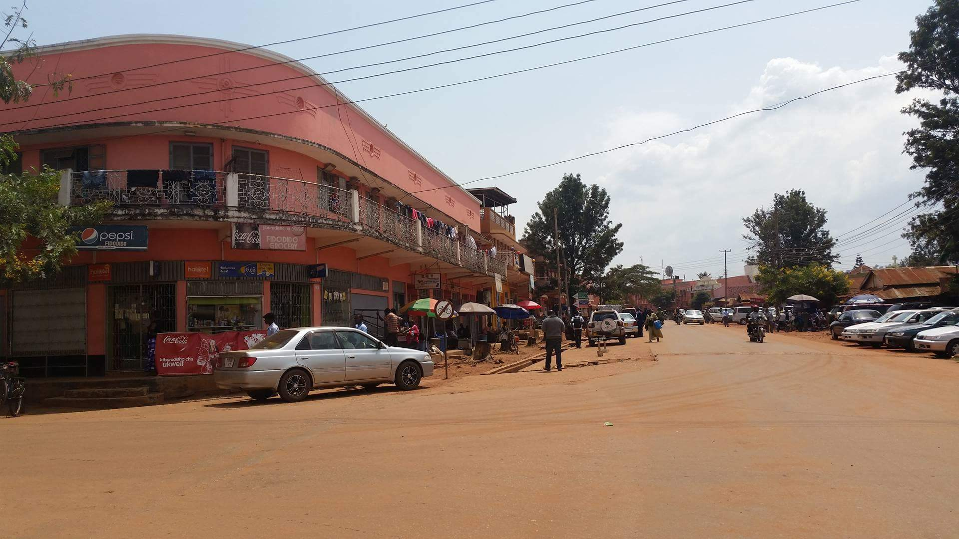 Bukoba in August 2017